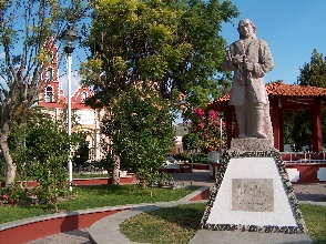 el jardín